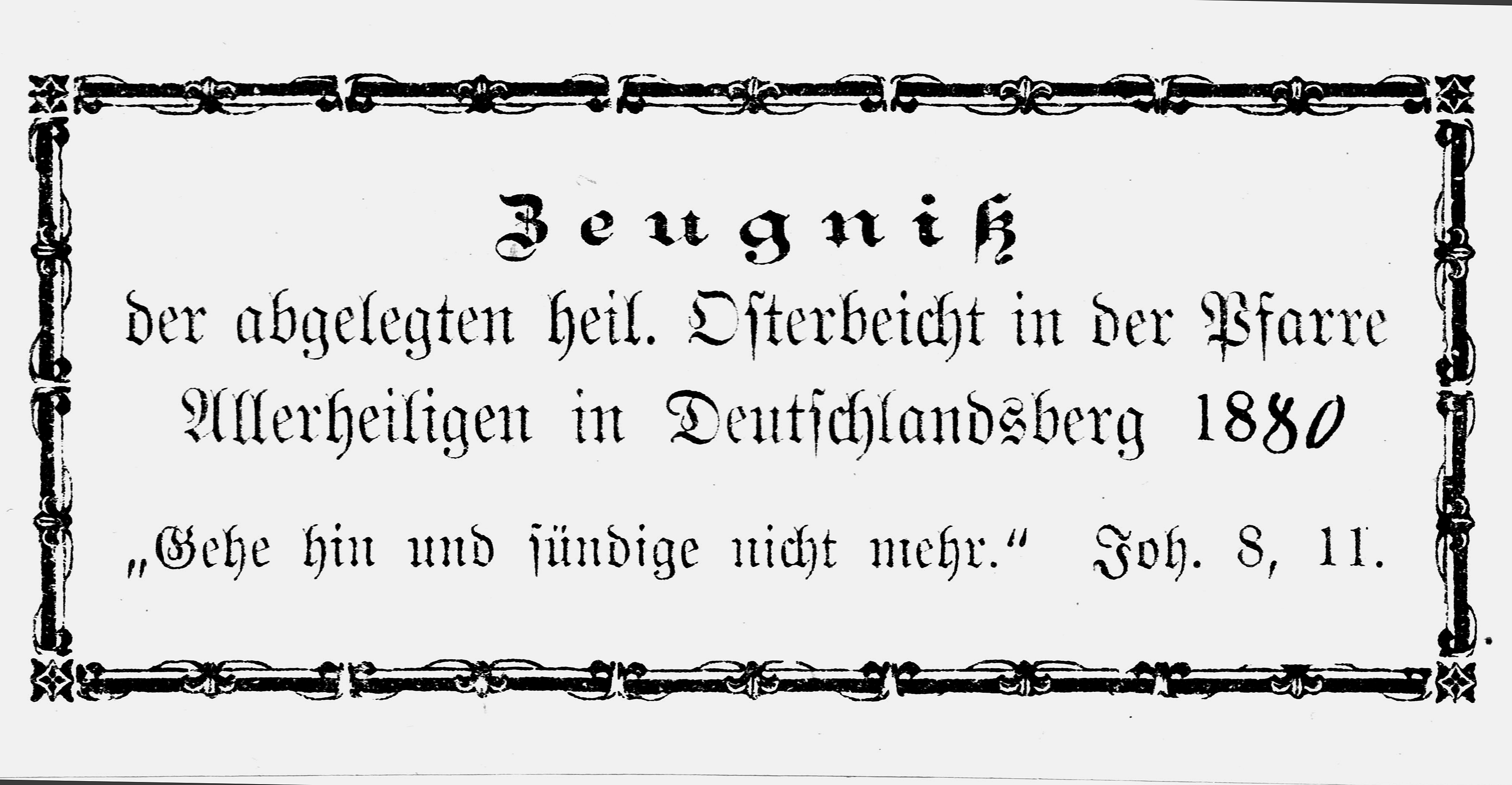 Bestätigung über die abgelegte Beichte in der Pfarrkirche Allerheiligen in Deutschlandsberg, Steiermark, Österreich 1880. Originalgröße 32 x 72 mm